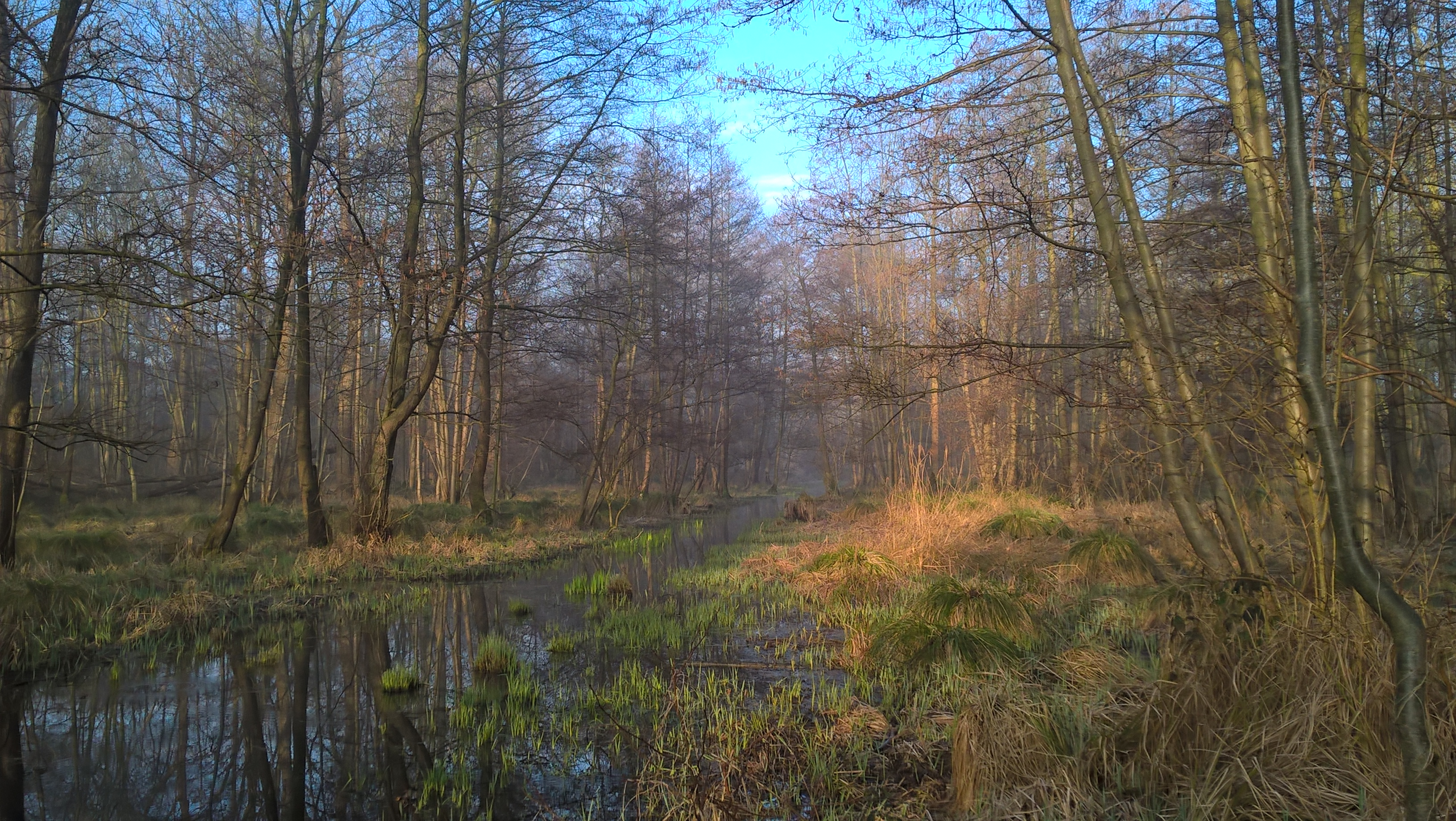 Naturschutzgebiet „Flöthbach“ (NSG KR-010) in Krefeld: Aufnahme von einer kleinen Holzbrücke aus in nord-westliche Richtung